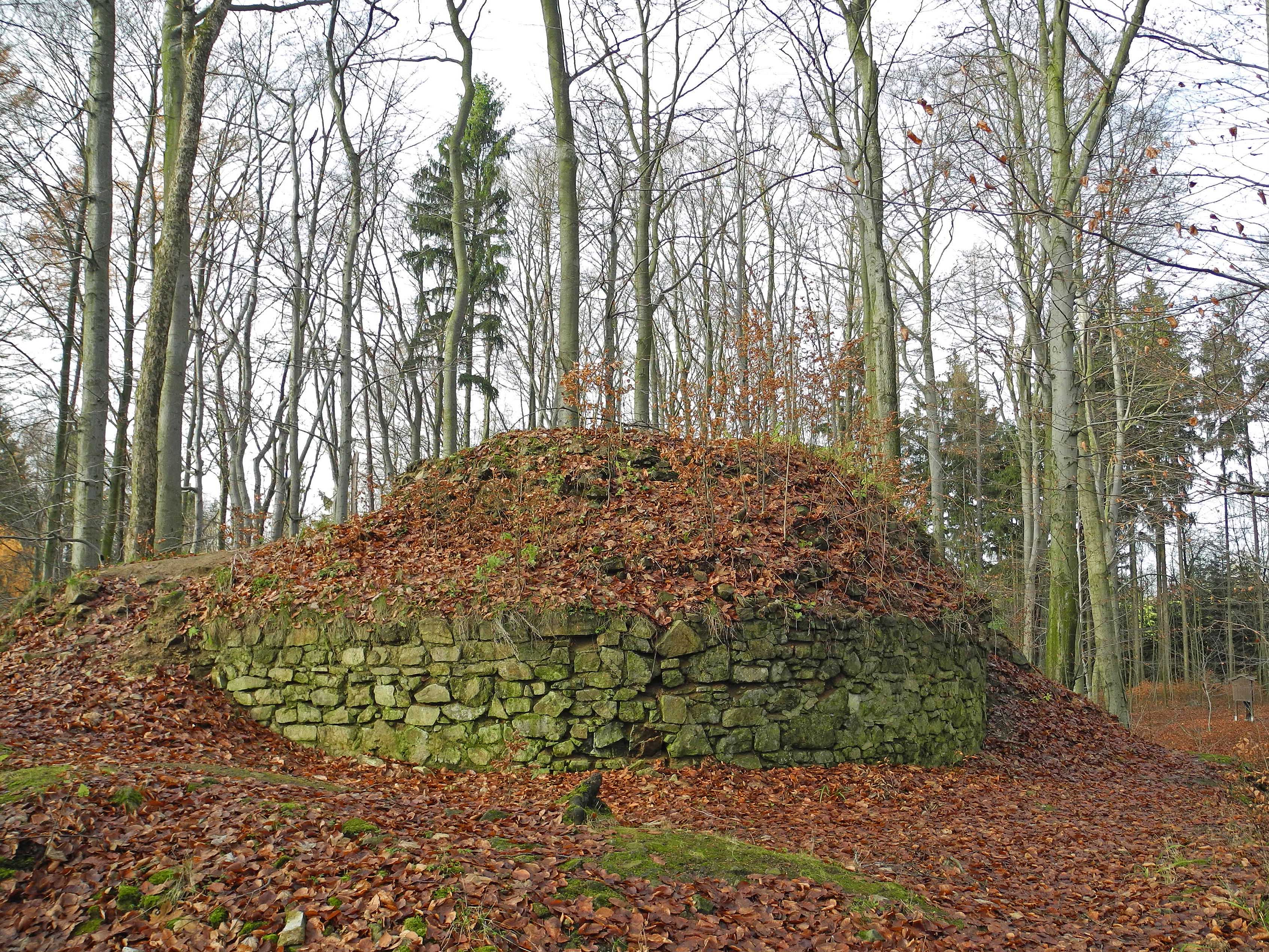 Burg Schönbuch bei Schönbüchel (Krásný Buk)